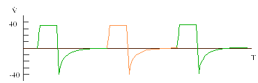 Courve débit/temps d'un patient ventilé en assisté/controlé. Le tracé en vert représente des respirations contrôlées et le tracé orange une respiration anssistée. Crée en octobre 2004 par staph.